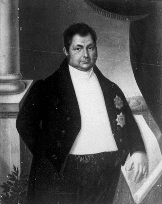 Fürst Georg Heinrich zu Waldeck und Pyrmont